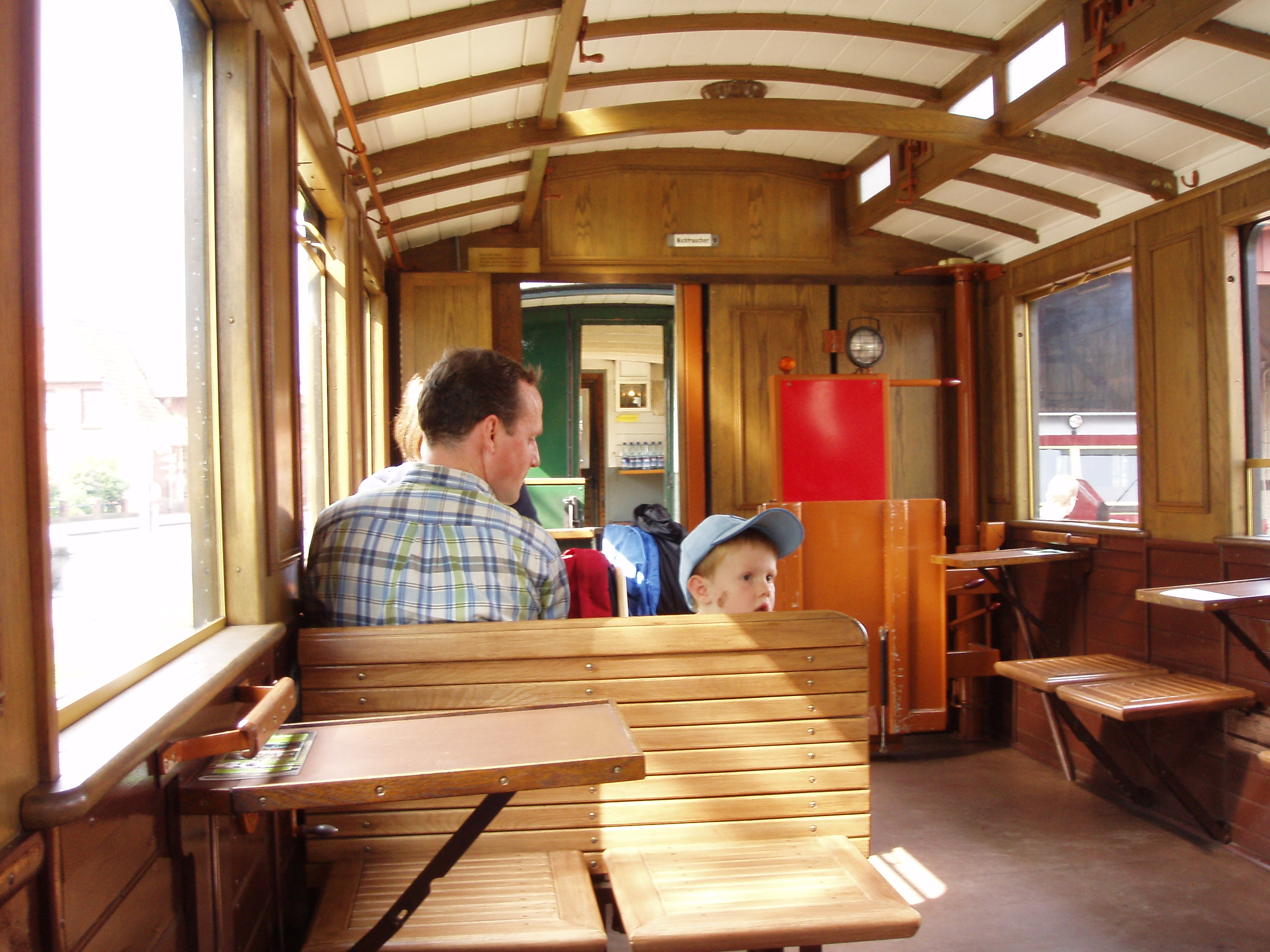 DEV 17 mit Blick in den Buffetwagen. DEV 17 wurde 1913 oder 1914 von der Waggonfabrik Wismar gebaut und war zunächst wohl bei der Kolberger Kleinbahn im Einsatz, die 1940 in den Pommerschen Landesbahnen aufging. Die Wagennummern beider Phasen sind nicht sicher überliefert. Infolge des Krieges ging der Wagen in den Besitz der Polnischen Staatsbahn über, wurde umgebaut und 1977 von einer Privatperson in Belgien gekauft. 1984 ging er in den Besitz der Selfkantbahn und dann in den der Märkischen Museumseisenbahn über. 1997 wurde er vom DEV übernommen und erneut umgebaut. Der Wagenkasten wurde ähnlich dem ursprünglichen Aussehen konstruiert, der Wagen aber für die Benutzung durch Rollstuhlfahrer ausgestattet. Die Hälfte der Sitze und Tische ist klappbar, die Fenster sind per Handkurbel zu bedienen, auf jeder Wagenseite befindet sich ein elektrohydraulischer Hublift. Seit 1998 ist der Wagen in seiner neuen Ausstattung beim DEV im Einsatz.